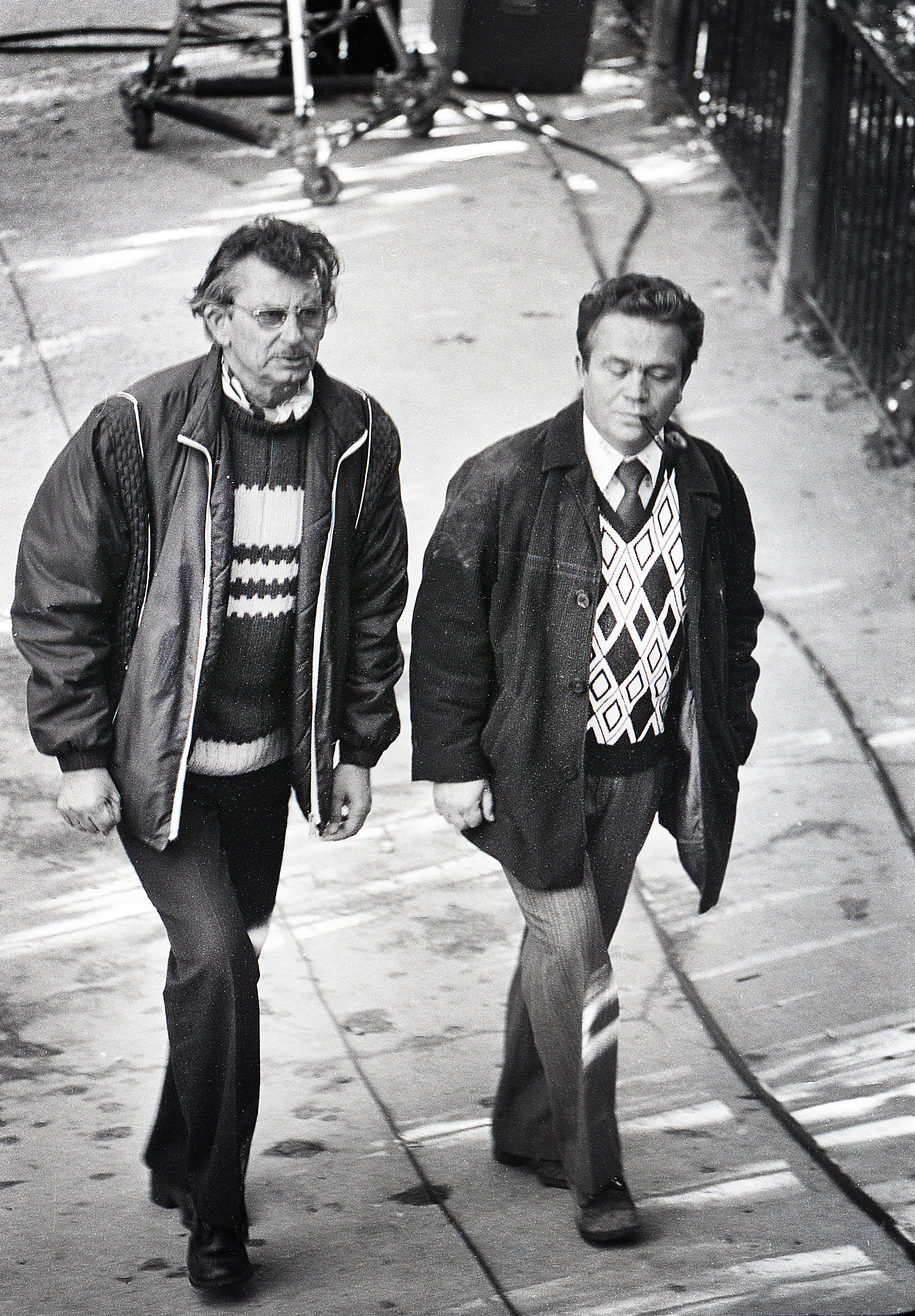 Karl Kalkun ja Jaanus Orgulas 1976. aastal